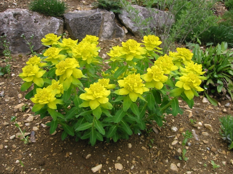 Vielfarbige Wolfsmilch, Goldwolfsmilch (Euphorbia epithymoides, Synonym: E. polychroma)